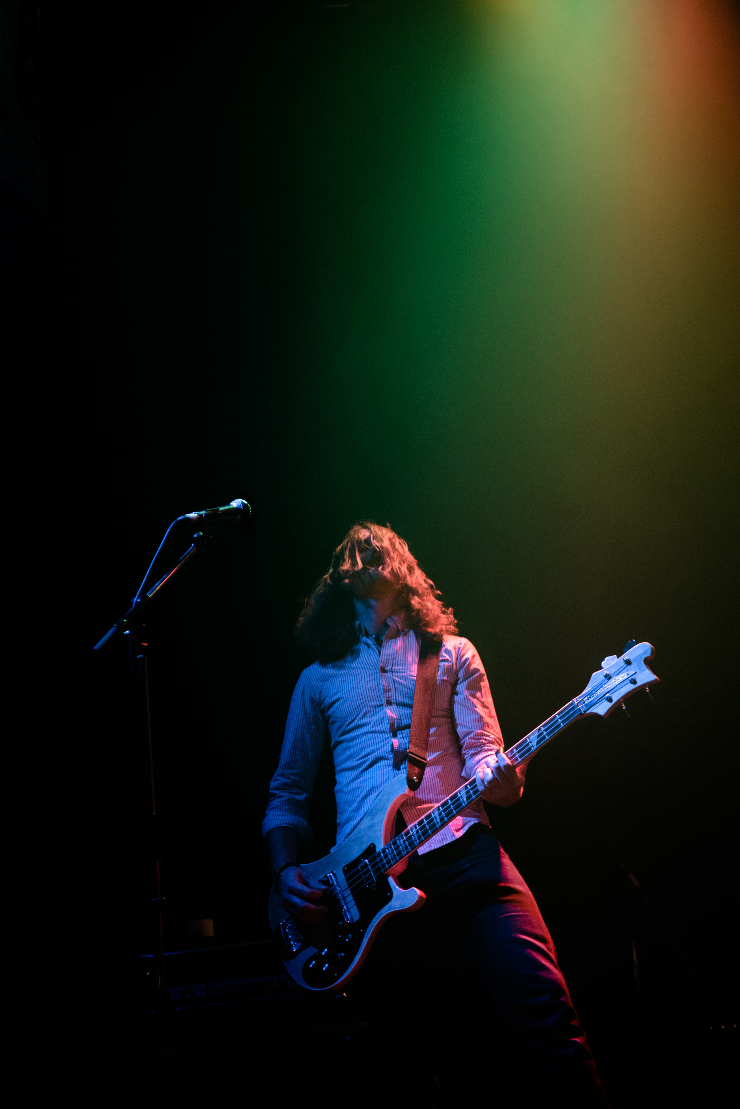 de The Builders and Butchers 2014 Muenchen Kranhalle